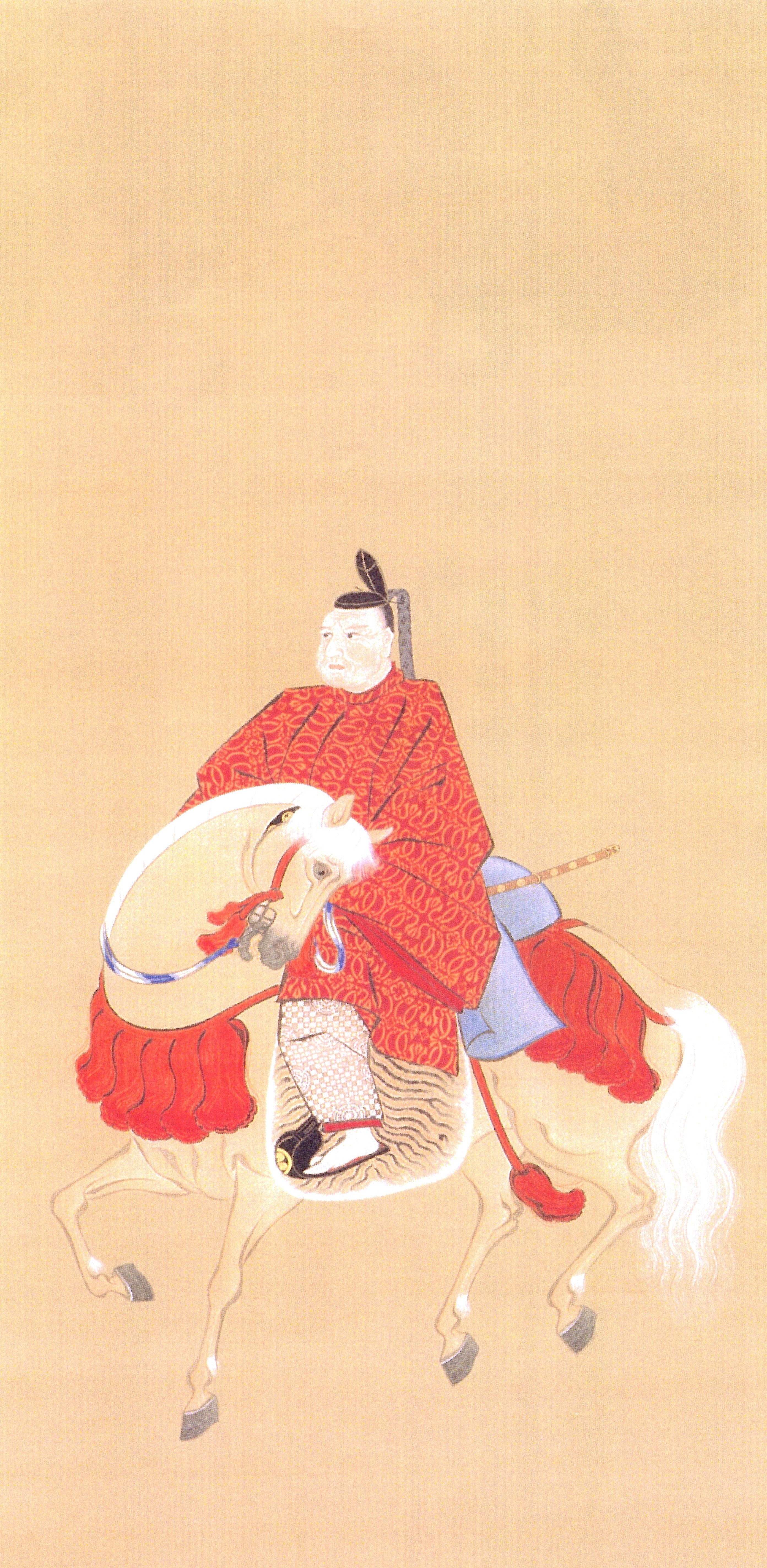 成瀬正寿(壽)の肖像。